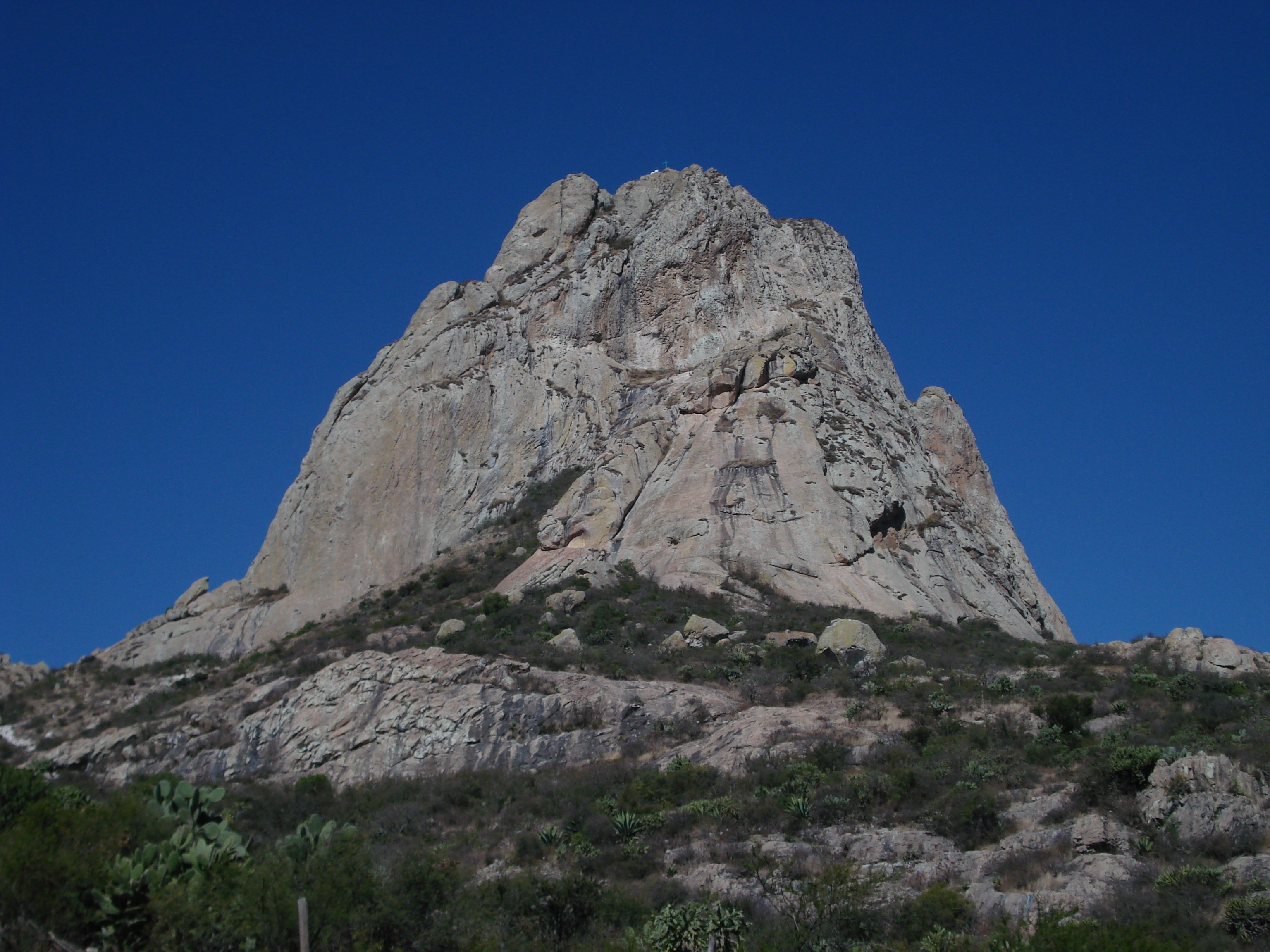 Peña de Bernal in Mexico.